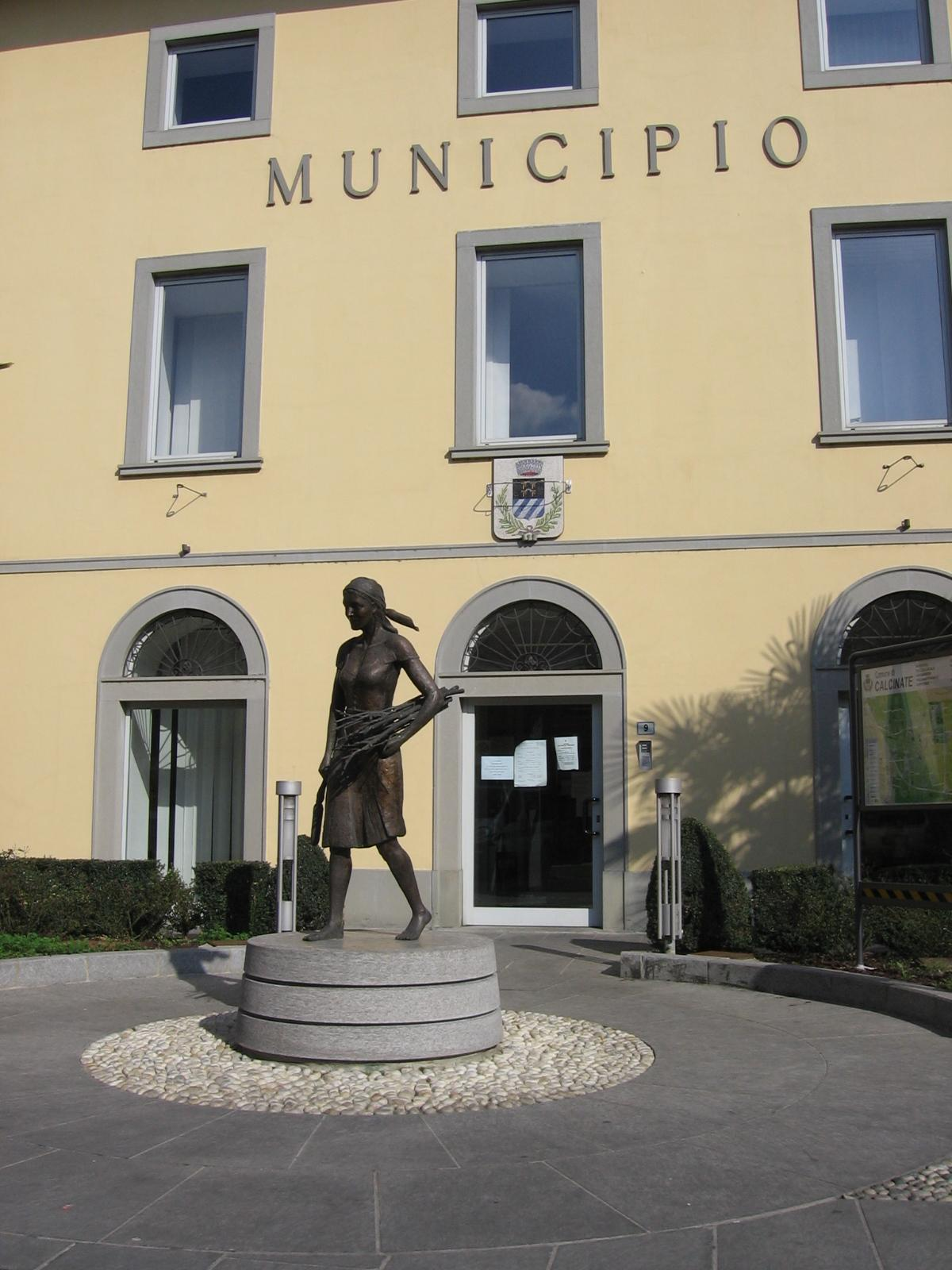 Calcinate, Bergamo, Italia